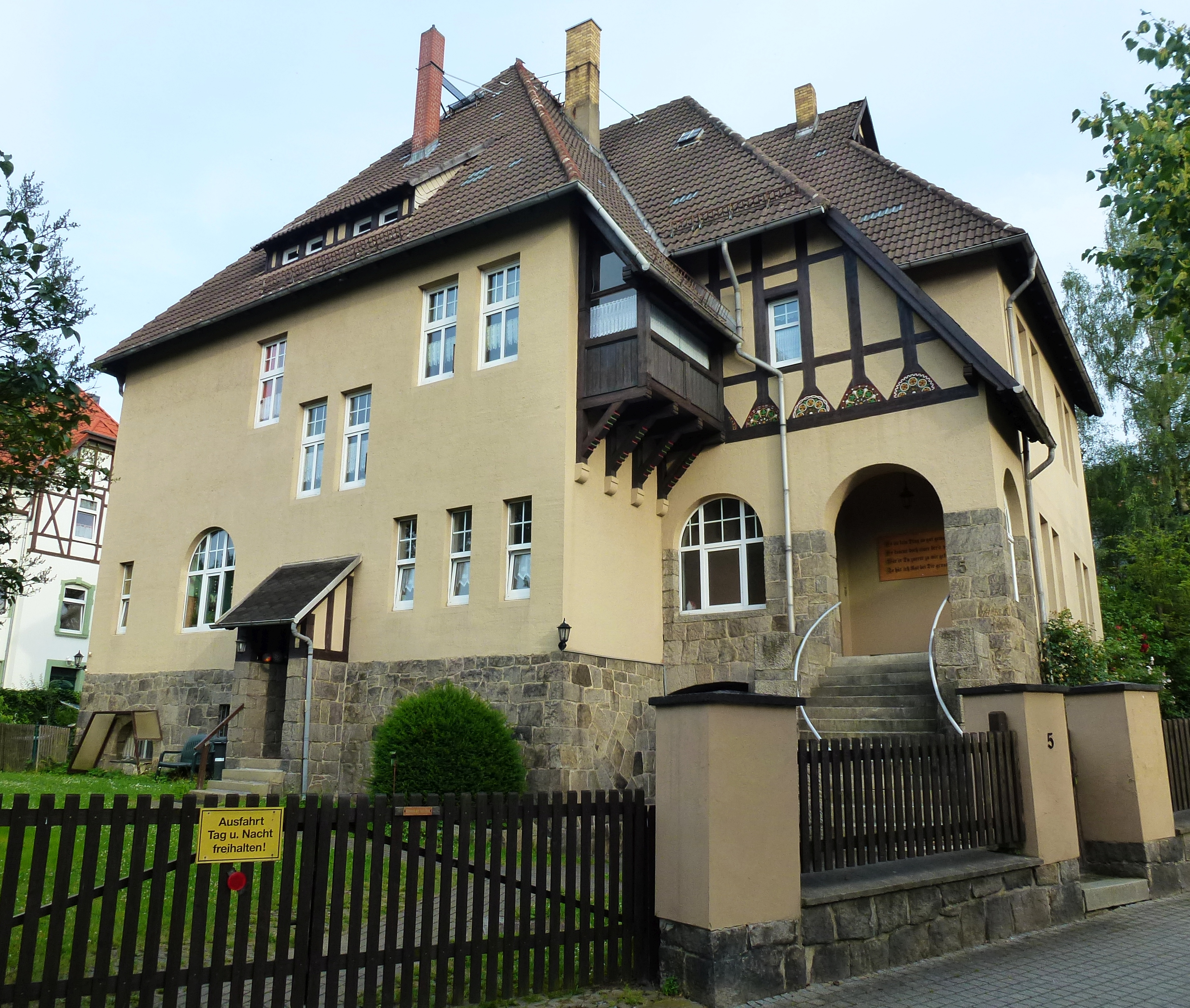 Villa Salzbergstraße 5 Wernigerode